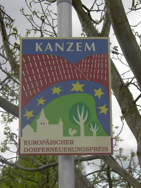 Hinweisschild auf den 2.Preis im europäischen Wettbewerb Foto :W.Thiel (eigenes Foto)